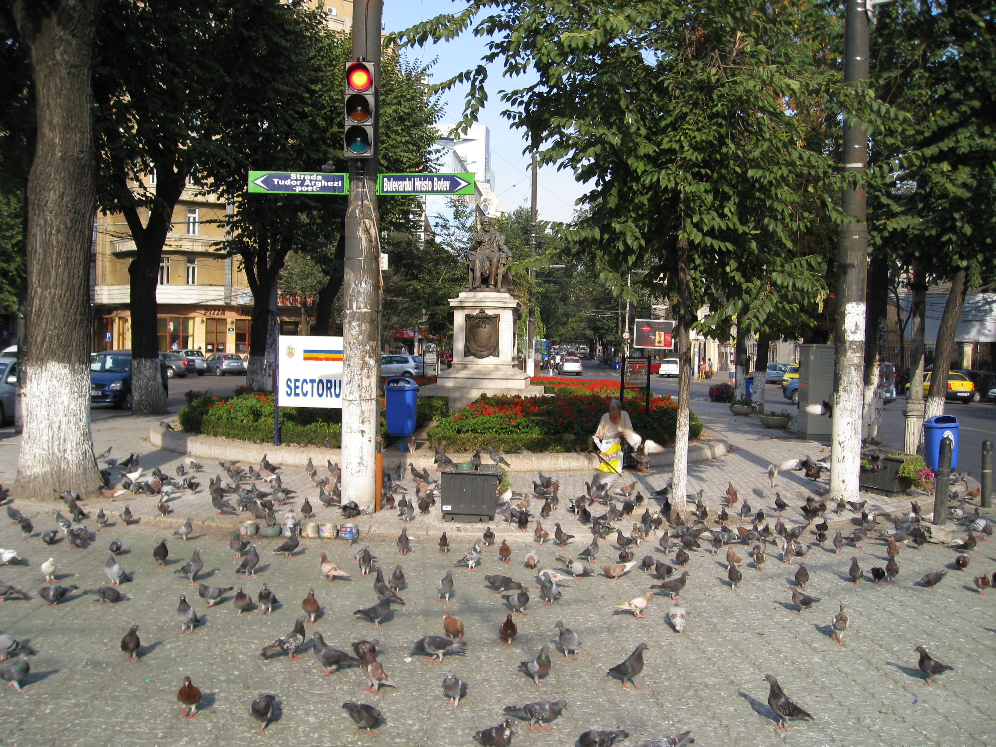 Piaţa Rosetti, Bucharest, Romania